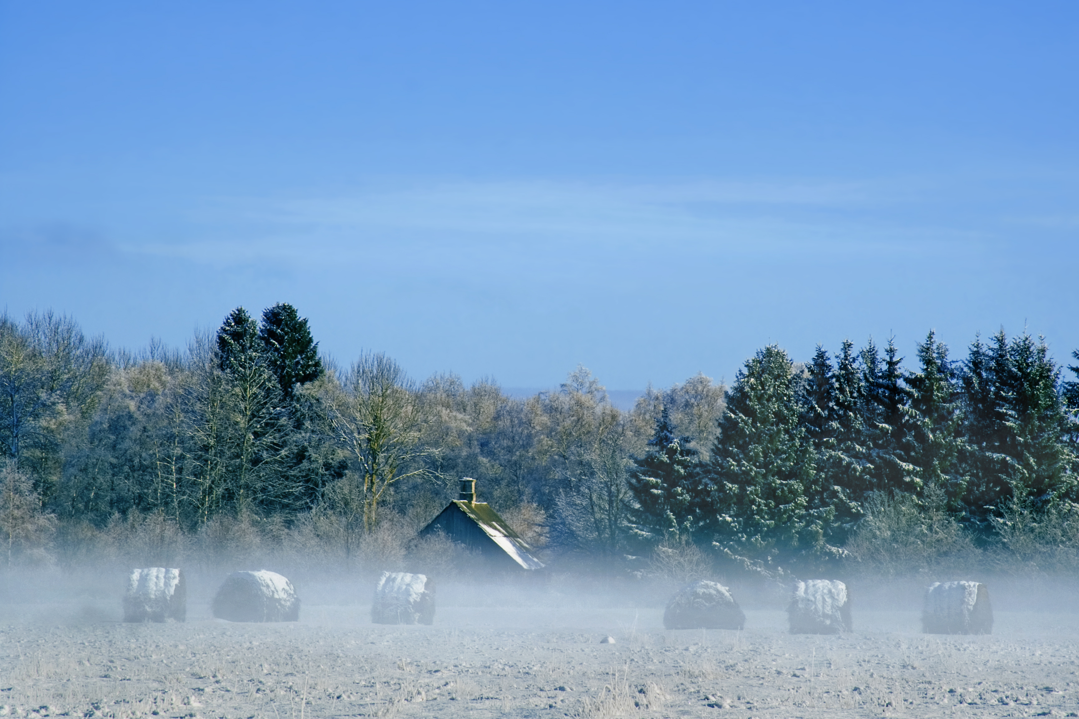 Heinarullid talvel